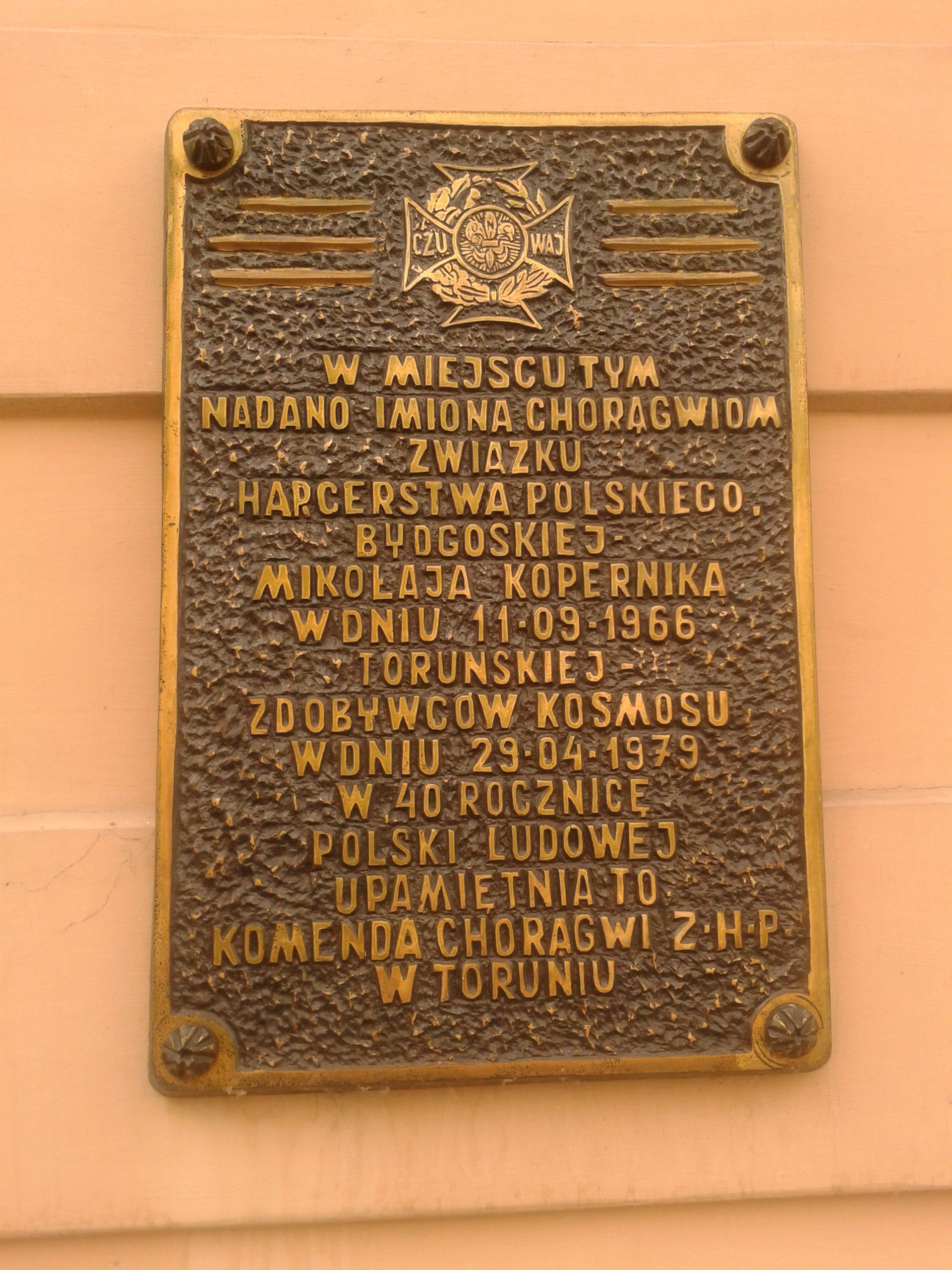 Tablica pamiątkowa na Domu Harcerza w Toruniu - tak zwany Pałac Meissnerów pod adresem Rynek Staromiejski 7 w Toruniu inskrypcja: W miejscu tym/ Nadano imiona chorągwiom/Związku/Harcerstwa Polskiego./Bydgoskiej -/ Mikołaja Kopernika/W dniu 11-09-1966/Toruńskiej-/Zdobywców kosmosu/W dniu 29-04-1979/ W 40 rocznicę/Polski Ludowej/Upamiętnia to/Komenda Chorągwi ZHP/ W Toruniu